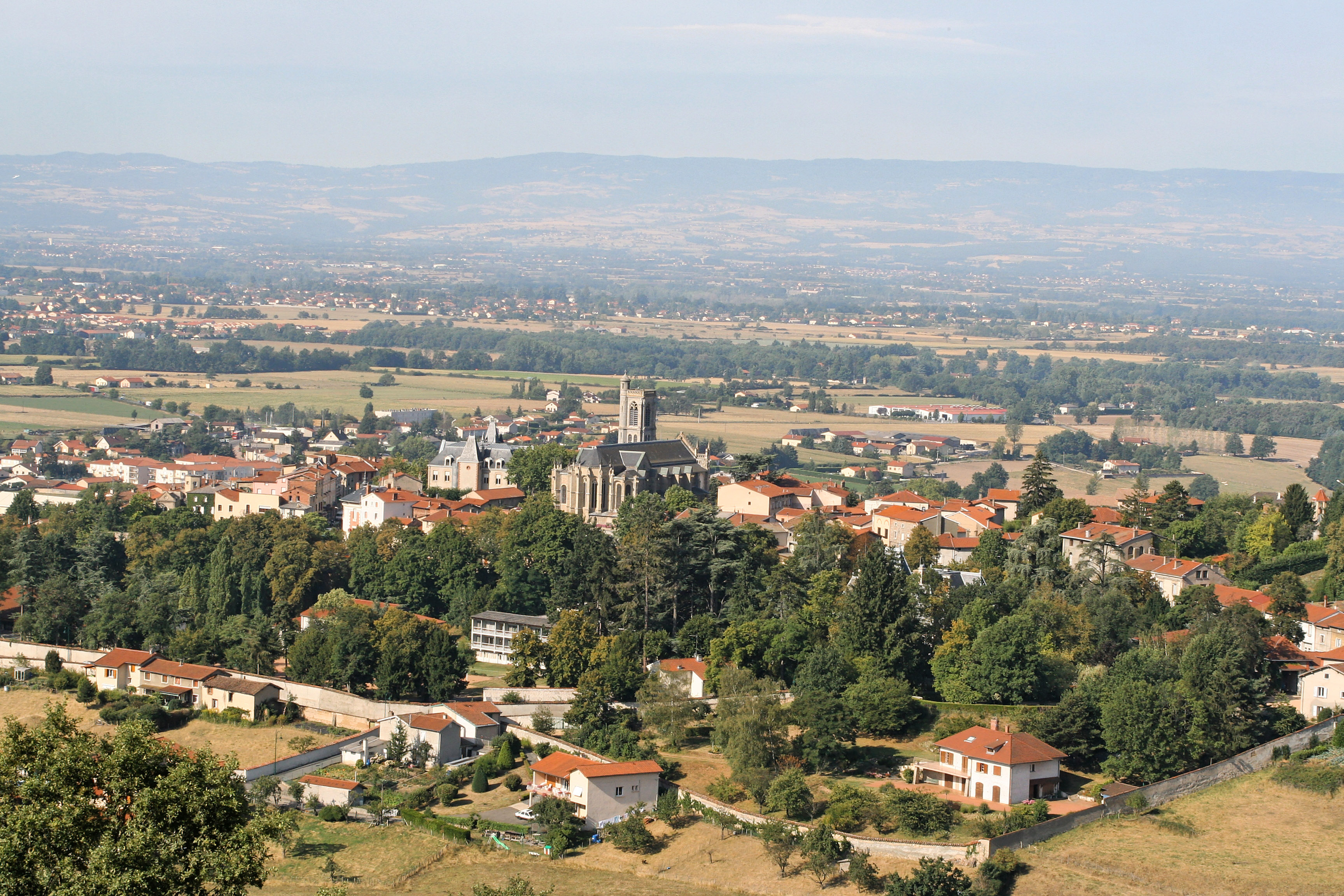 Saint-Galmier -Loire (42) - France - Vue du lieu-dit, les trois croix